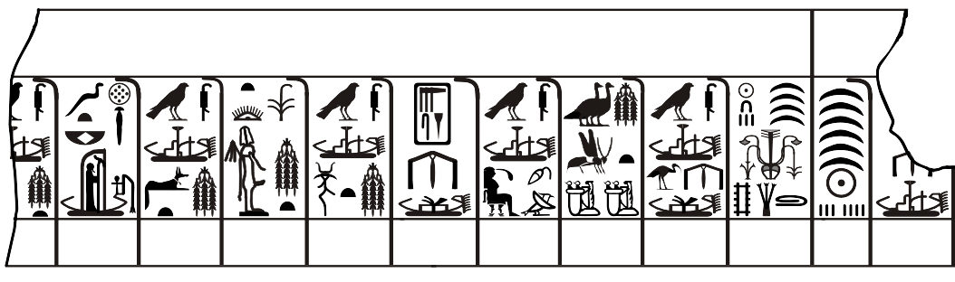 Regierungsbeginn des frühägyptischen Königs Djer (1. Dynastie) auf dem Kairostein (nach John D. Degreef und W. Helck) / beginning of the government time of king Djer (1st dynasty of Egypt) on the Cairo stone fragment (after John D. Degreef)